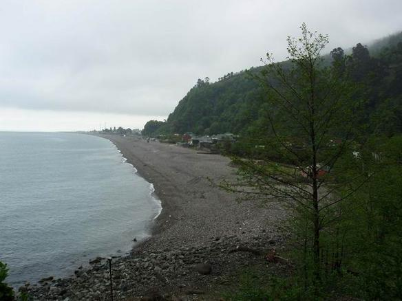 Kvariati, Georgia